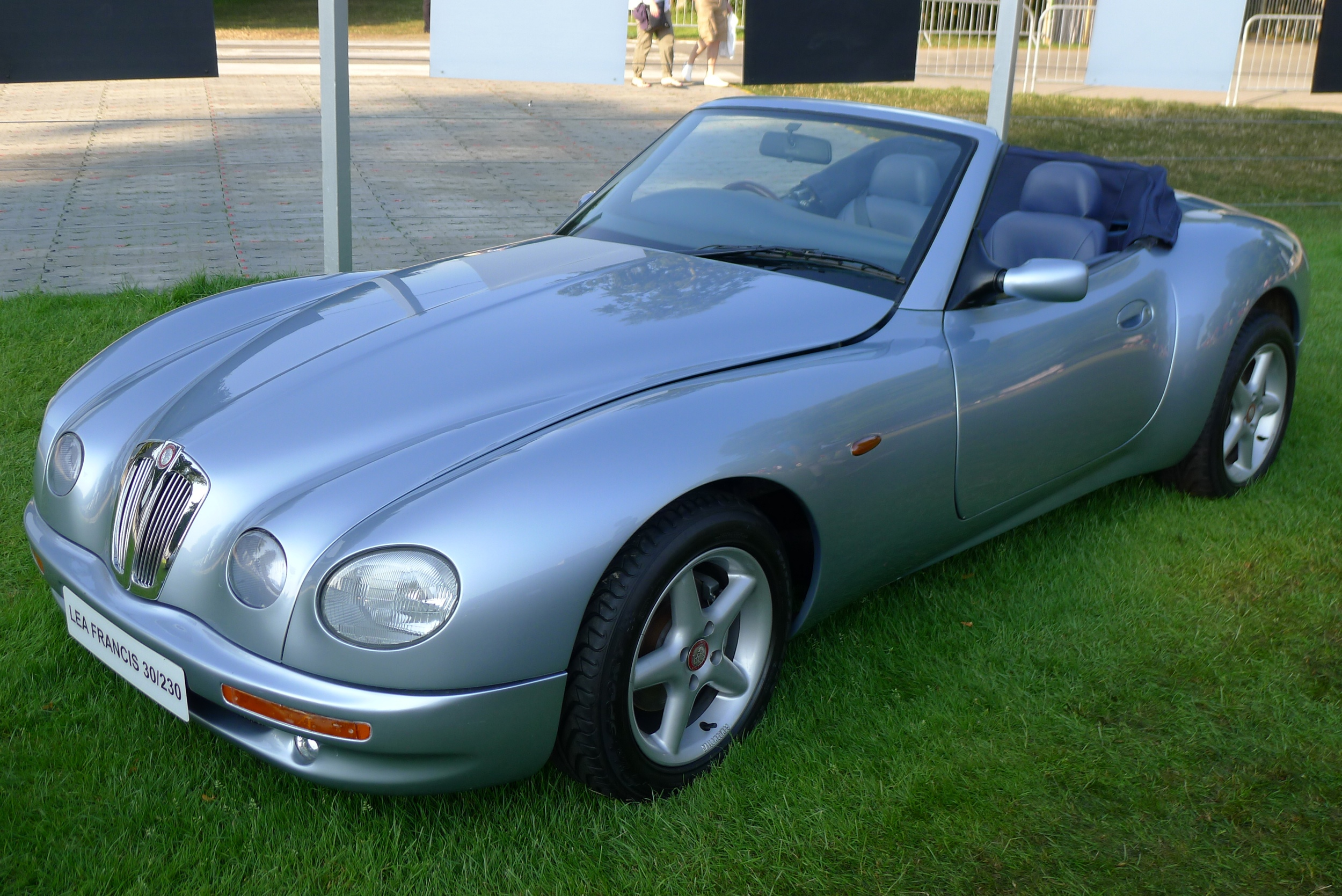 Lea Francis 30230